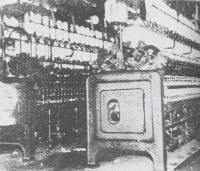 경성방직(京城紡織)에서 수입한 일본 도요타방직기(豊田紡織機) 기계